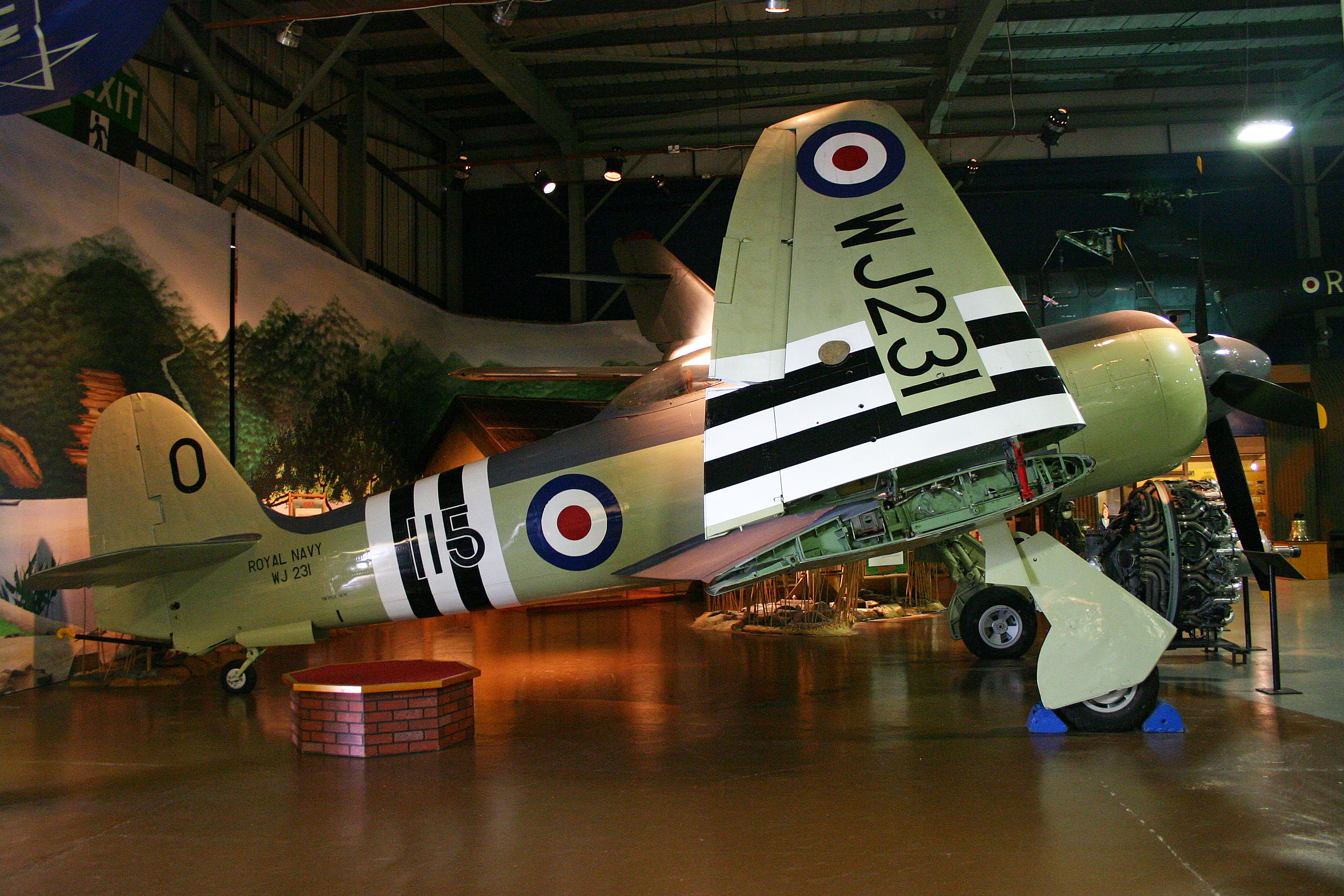 FAA Museum Yeovilton. 15-6-2011